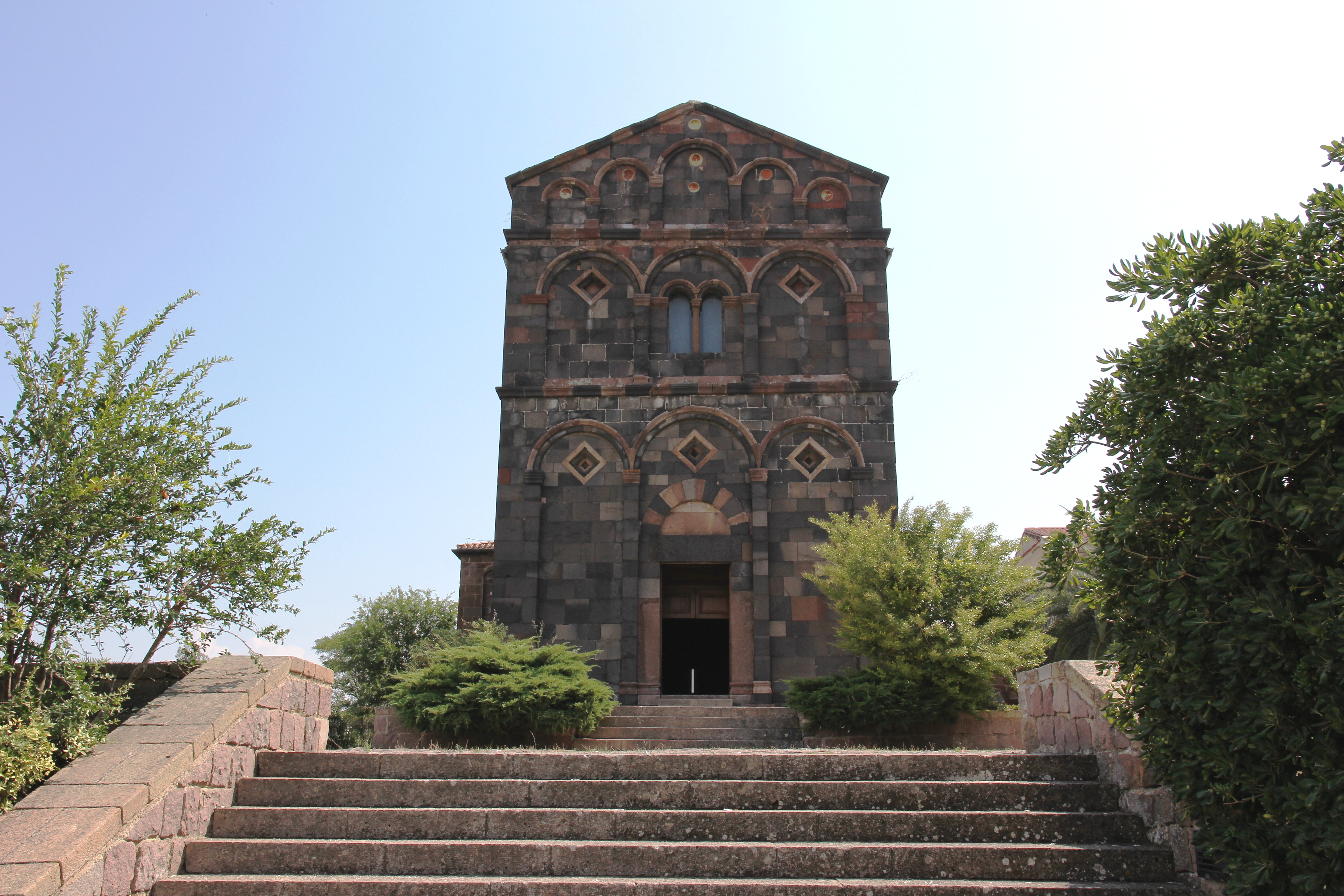 Ottana - Chiesa di San Nicola